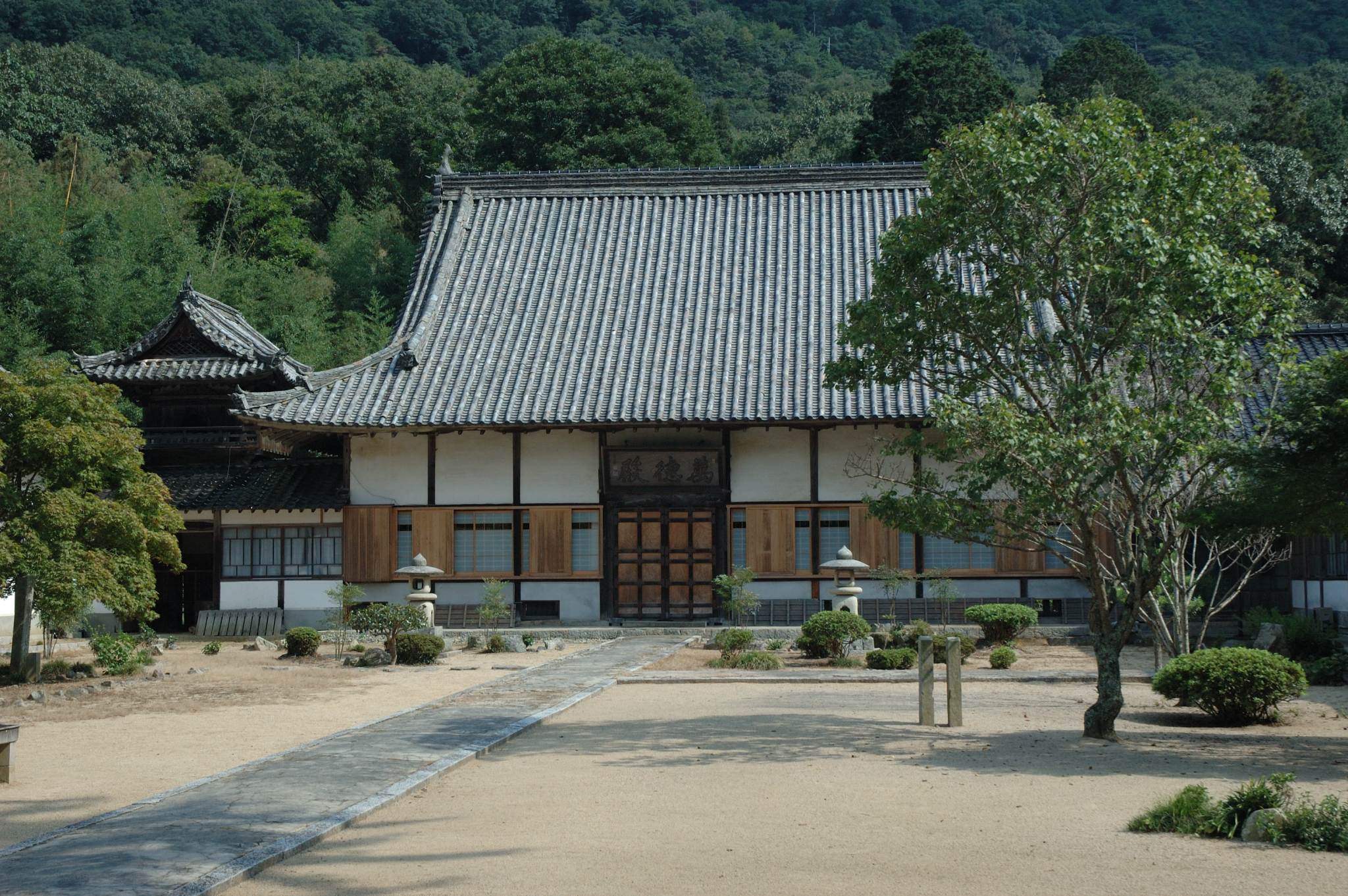 Main tenple "Mantokuden"